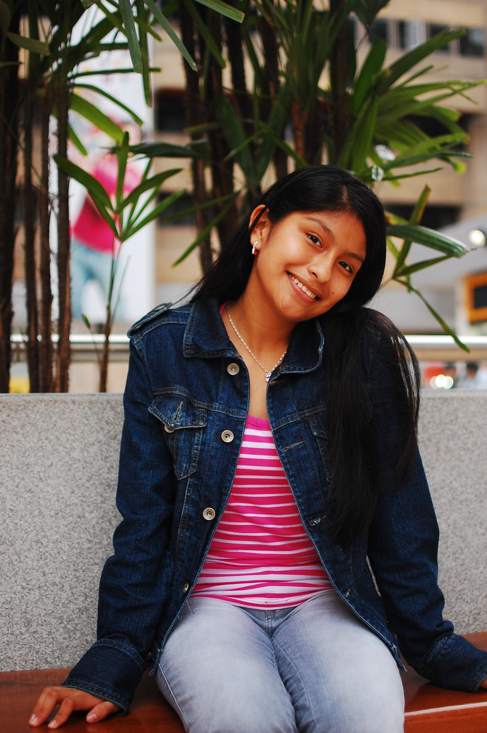 Wendy Sulca en Lima, Perú, en enero de 2010.